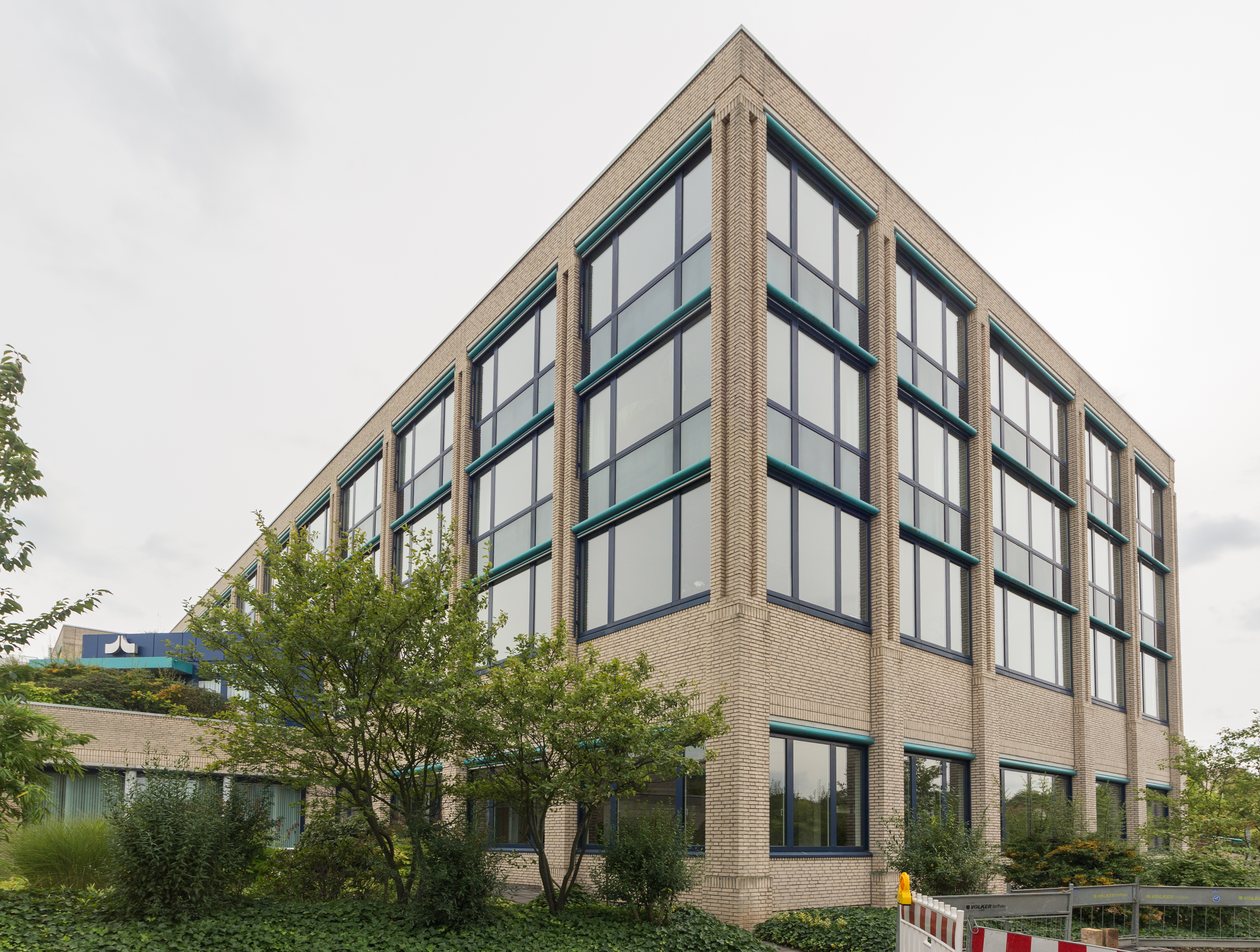 Josef-Wirmer-Straße 1–3, Bonn: Blickrichtung Südwest